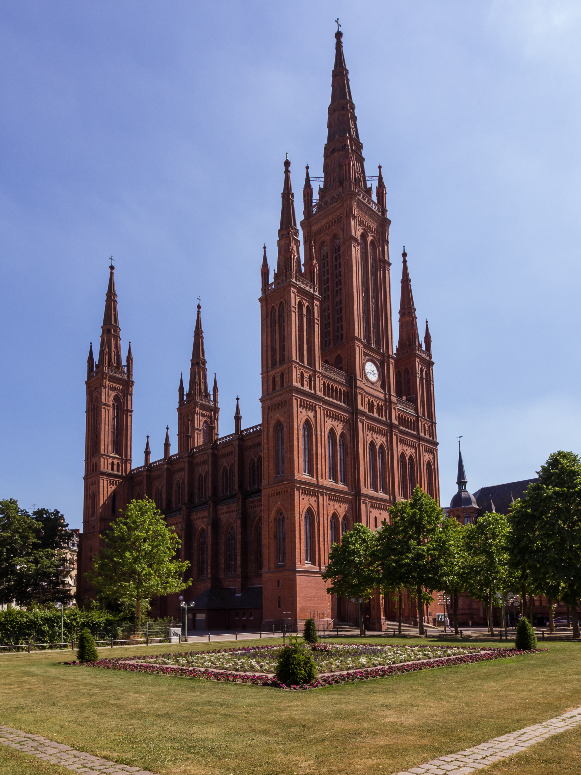 Marktkirche Wiesbaden bei Sonnenschein, von Norden fotografiert.